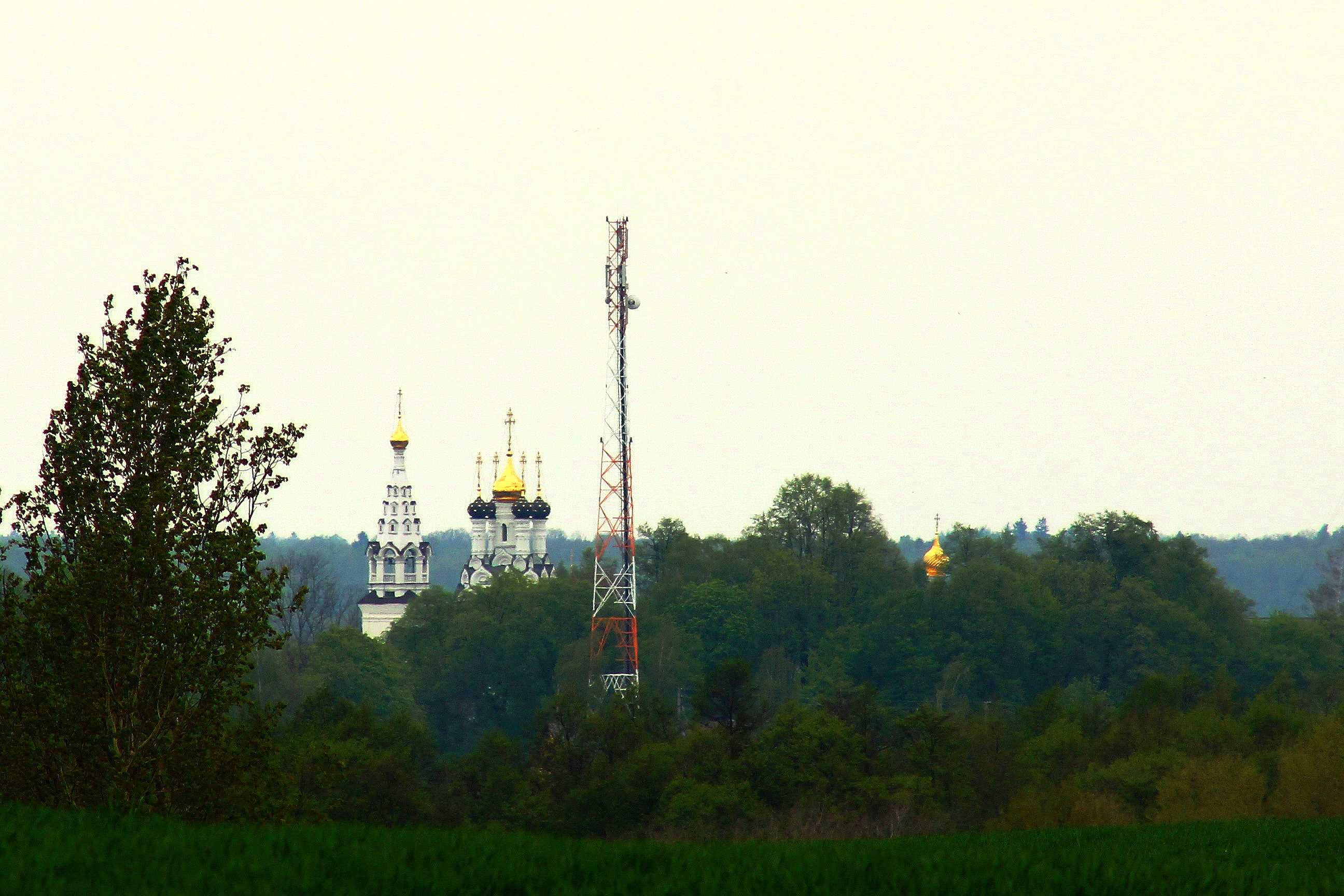 Widok z drogi do Warszkajt na prawosławną cerkiew w Iławie Pruskiej (ros. Bagrationowsk).